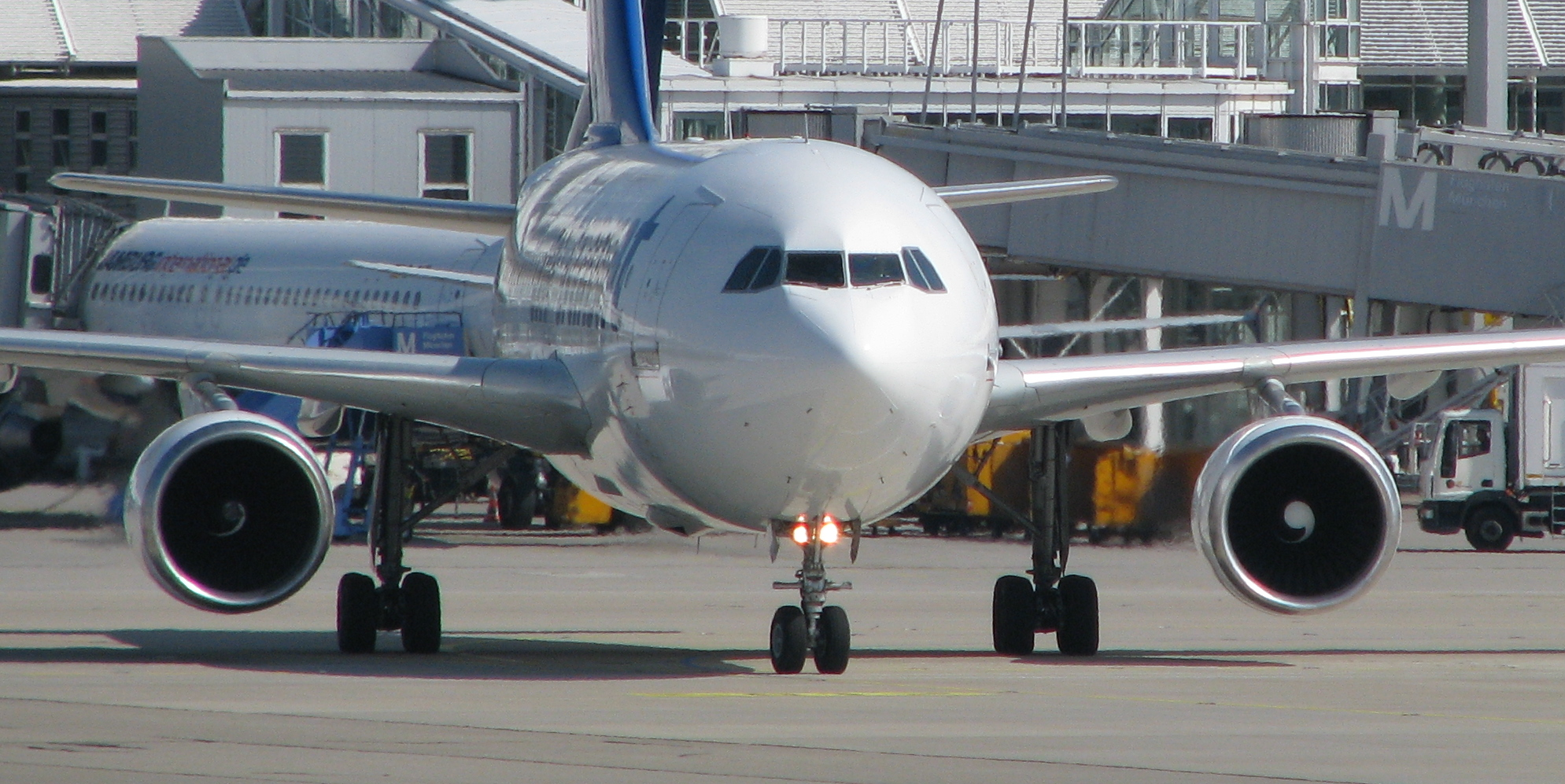 JETS_A310-304_Jets_unterhalb_der_Tragflaechen